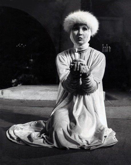 В роли царицы Анны, спектакль "Василиса Мелентьева", театр им.Ермоловой, 1982 г.